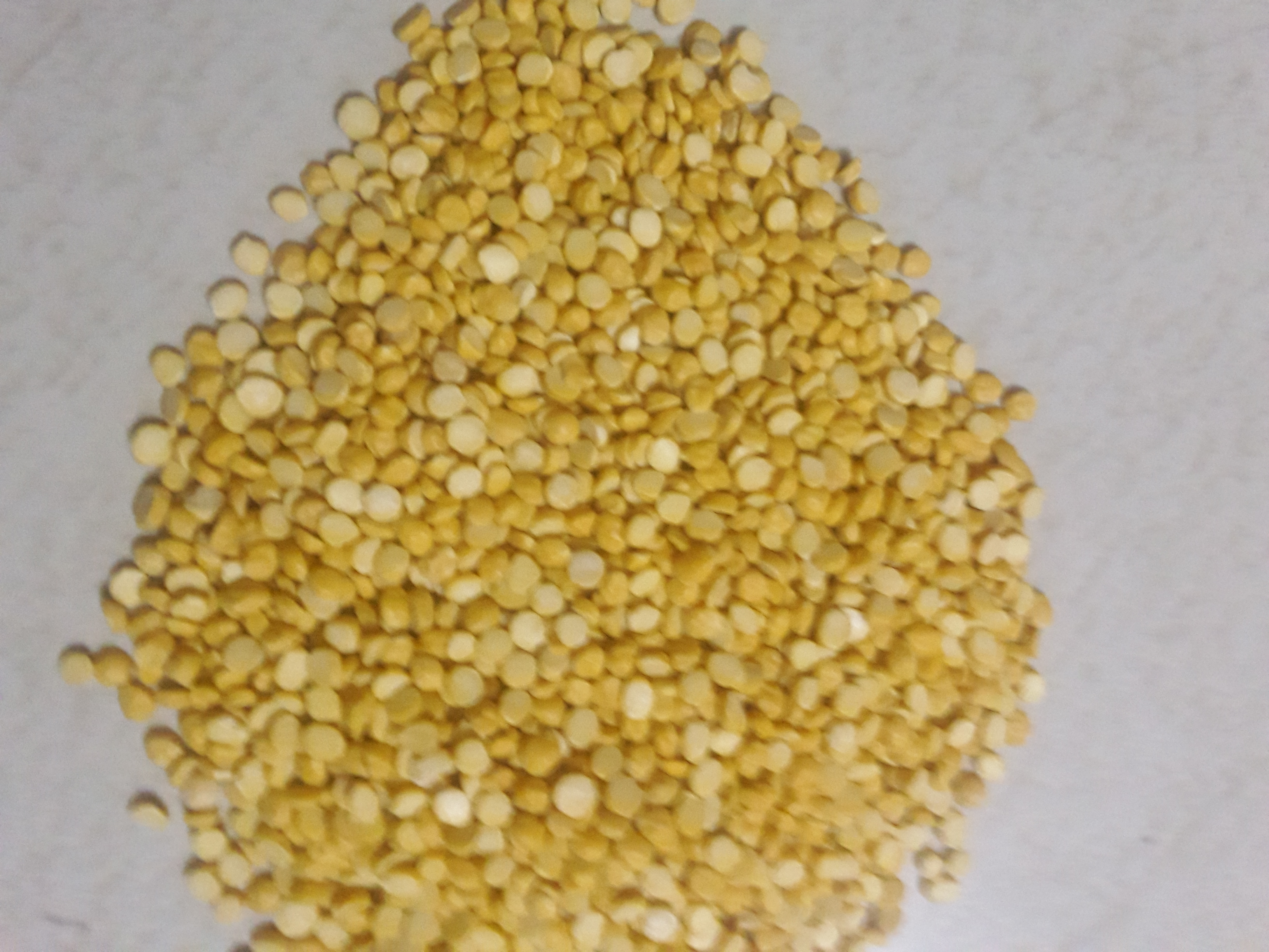 கடலைப் பருப்பு உ ணவுப்பொருள்